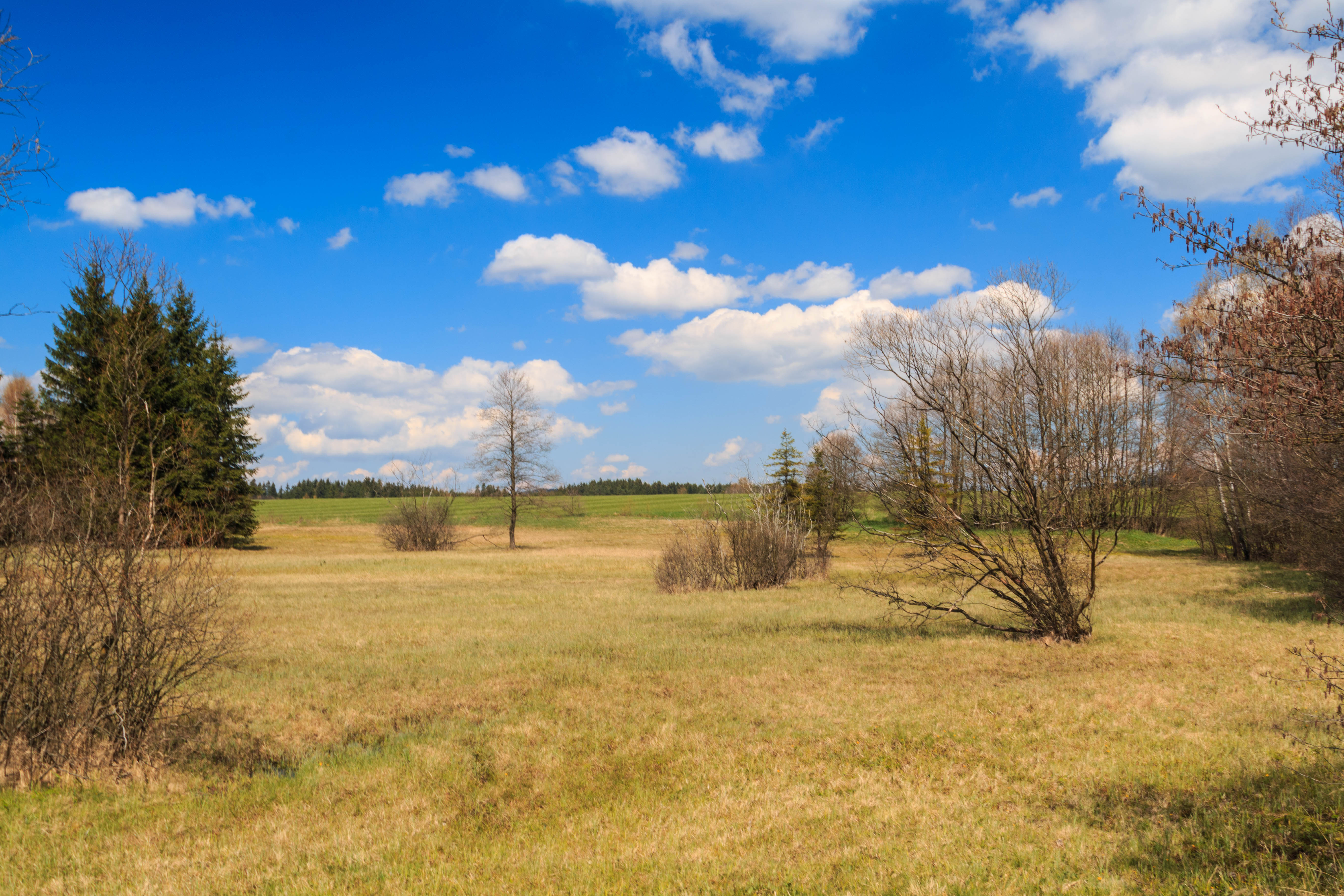 Přírodní památka Zlámanec Project: Chráněná území.